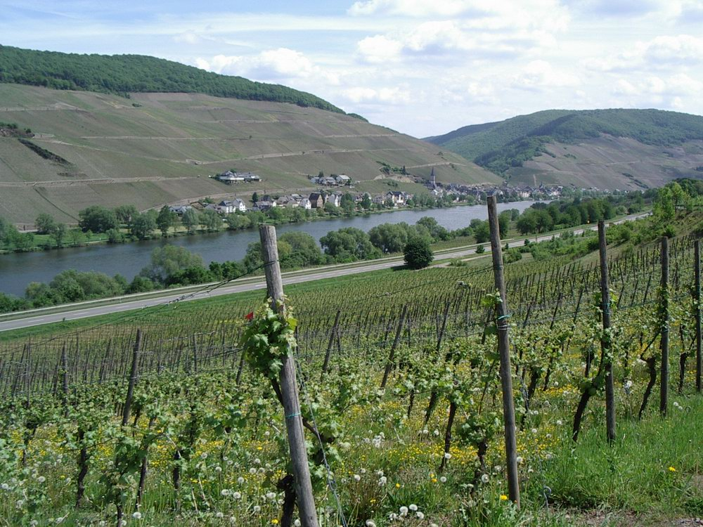 Zell (Mosel), Deutschland